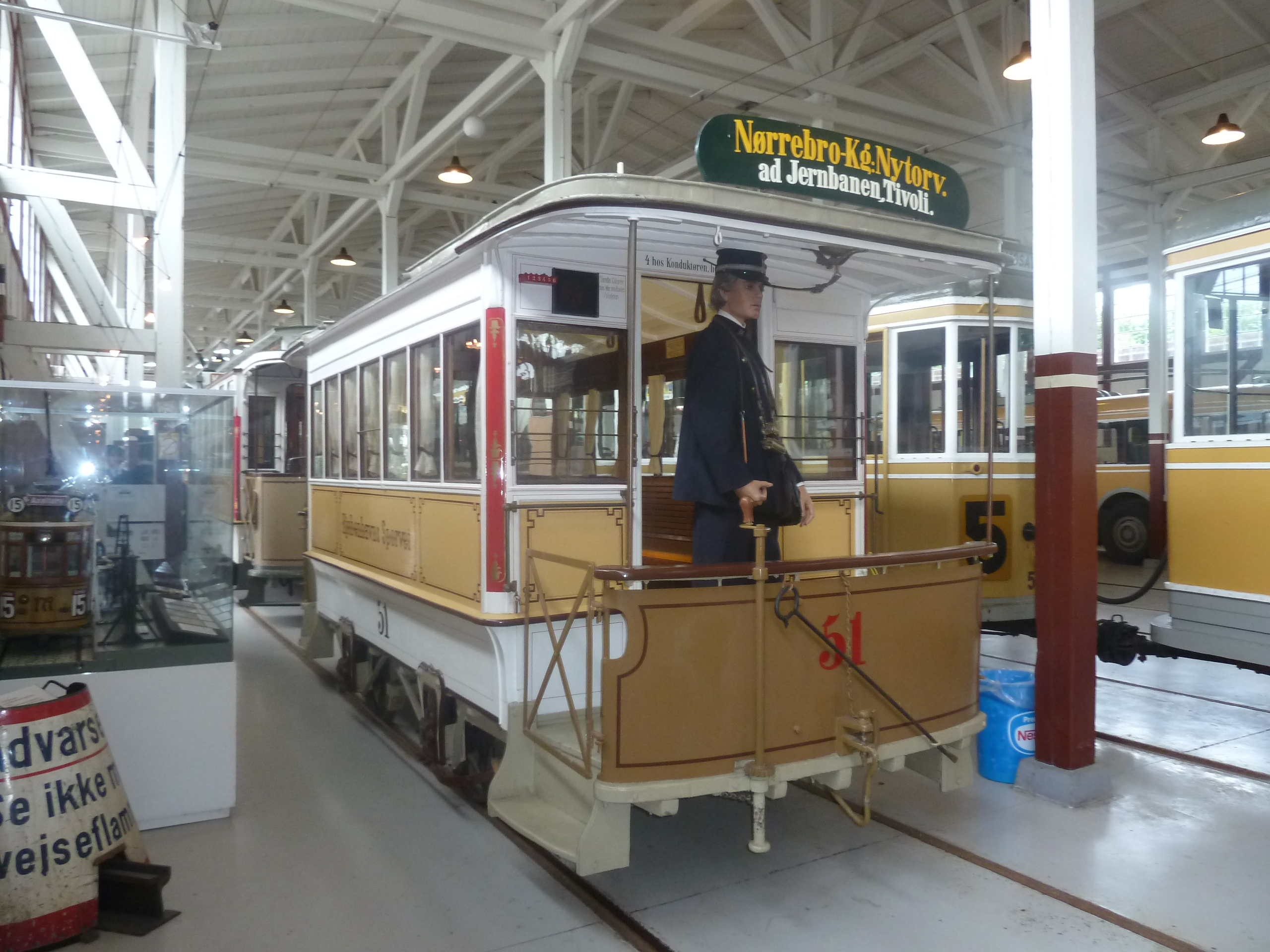 Old horse tram from Copenhagen, KSS 51, Sporvejsmuseet Skjoldenæsholm in Denmark.